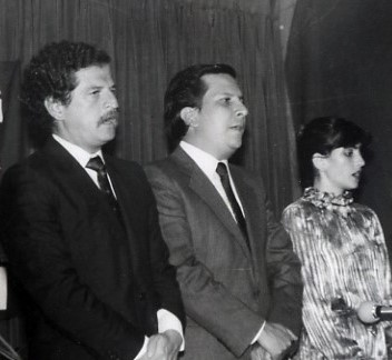 Luis Carlos Galán, Rodrigo Lara Bonila y Gabriela White de Vélez, líderes del Nuevo Liberalismo asesinados.